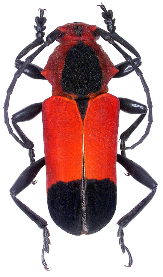 Euryphagus maxillosus (Olivier, 1795) [= Euryphagus pictus (Voet, 1778)] det. F. Vitali Grösse: 19-23 mm Fundort: Philippinen, Leyte, Balocane leg. 2006; Foto: U.Schmidt, 2006